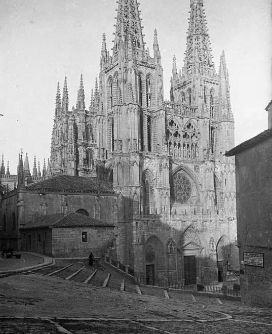 Imatge